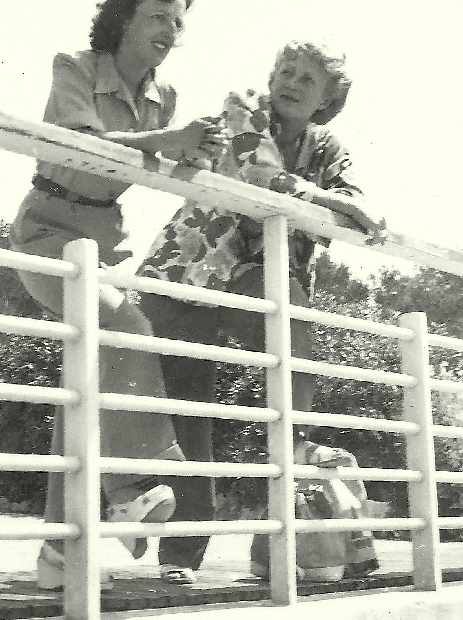 Annie Ducaux lors d'une pause dans le tournage de Les Requins de Gibraltar avec Irène Reinert, l'épouse du réalisateur E.E. Reinert près de Villefranche-sur-Mer, France